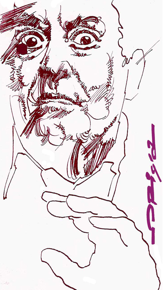 attore, poeta e regista italiano